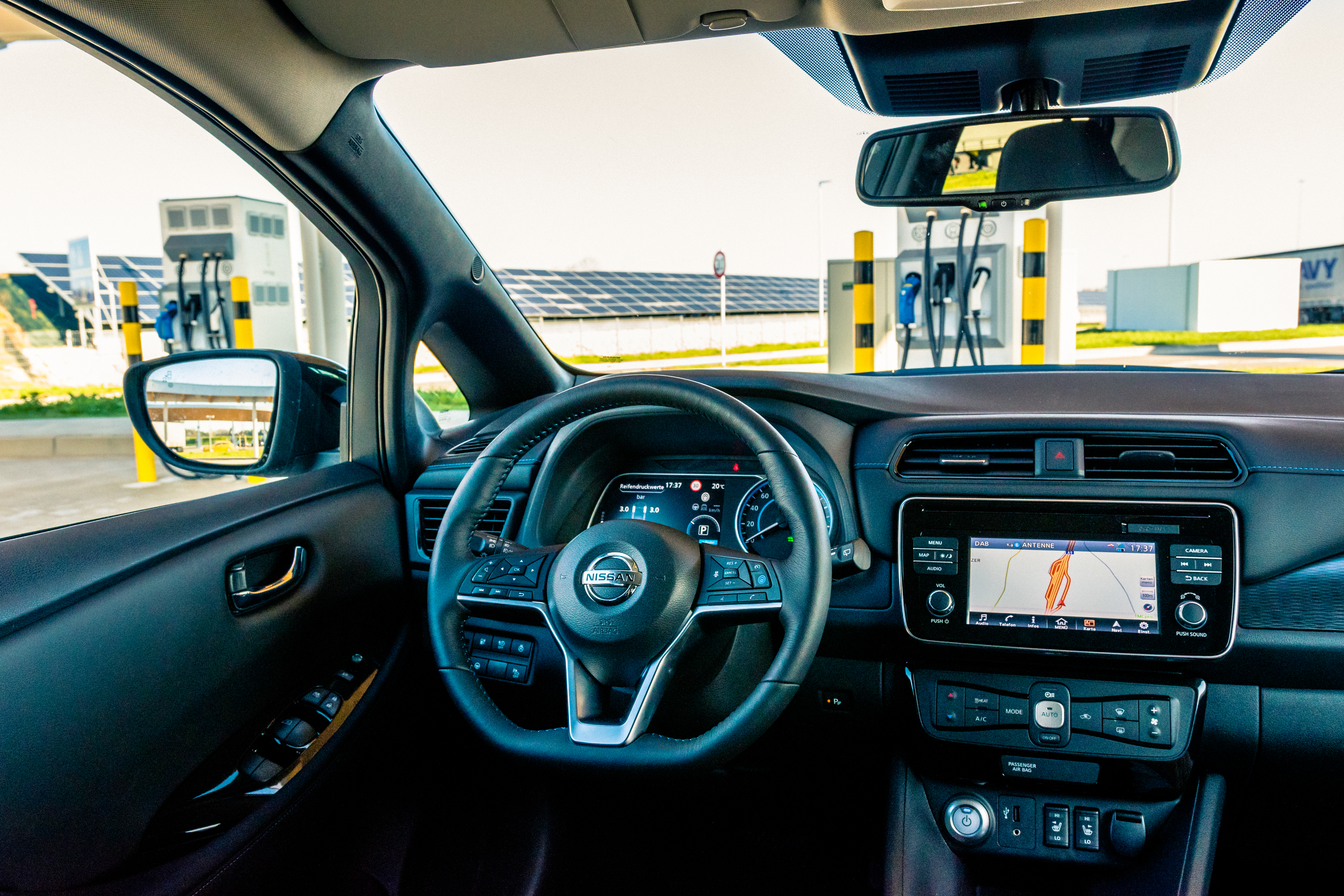 Das Team von CLEANELECTRIC fährt den neuen Nissan Leaf 40 kWh Probe.